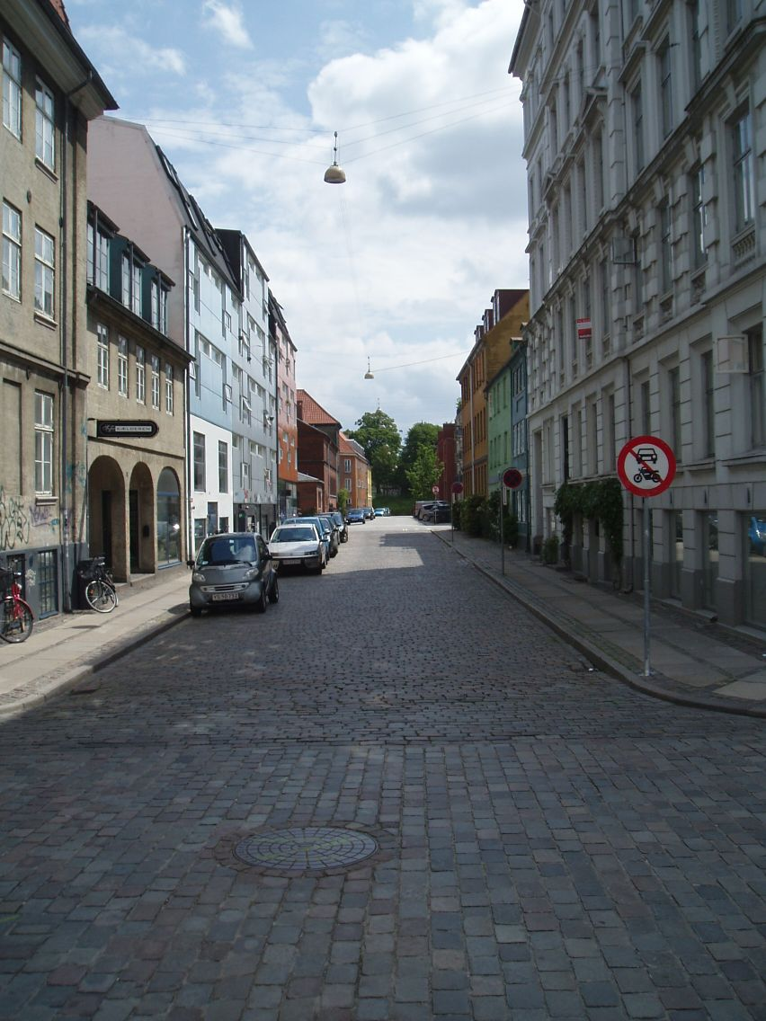 Sofiegade på Christianshavn